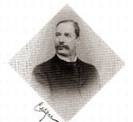 Ritratto fotografico